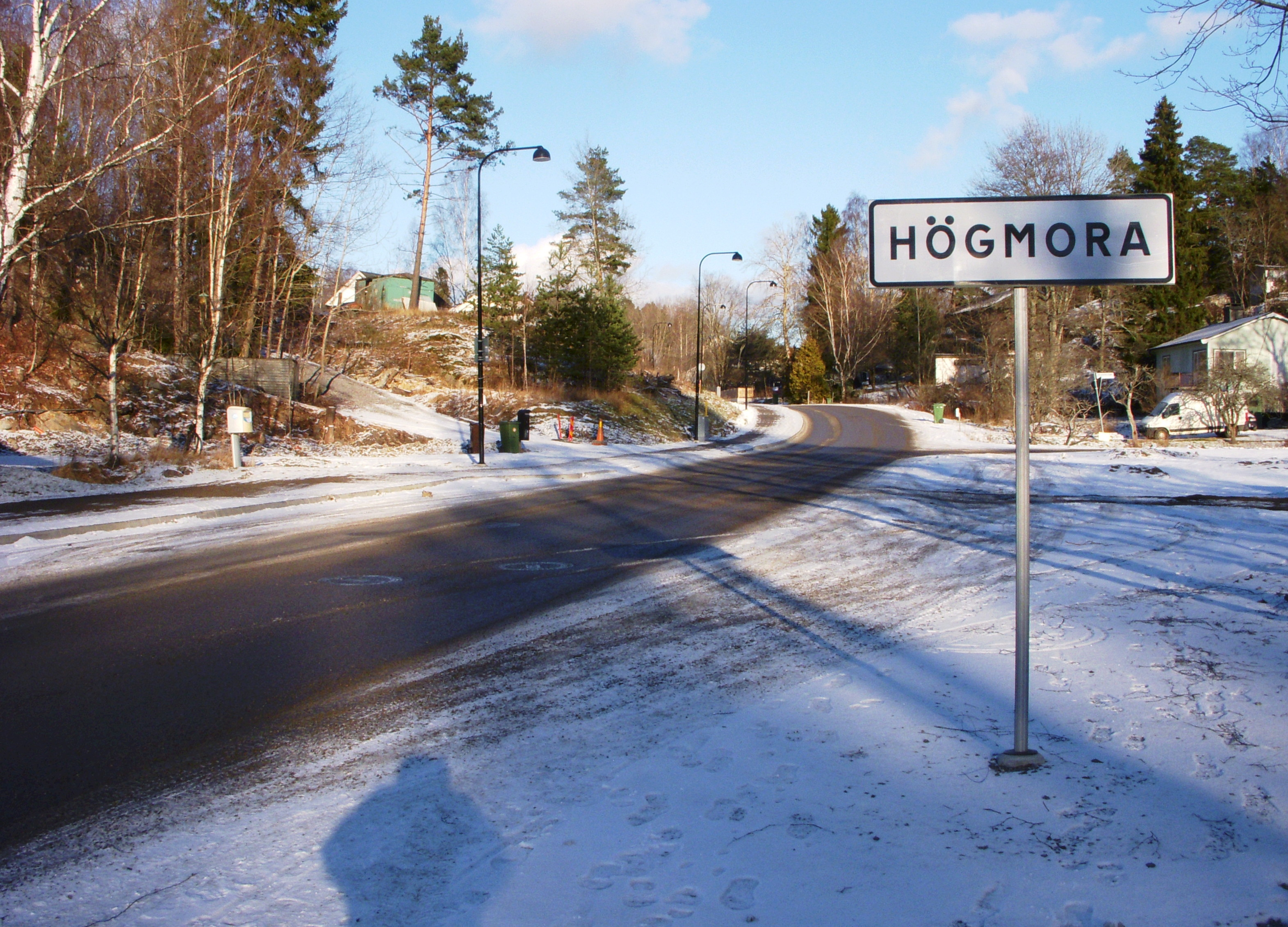 Villaområdet Högmora, Huddinge